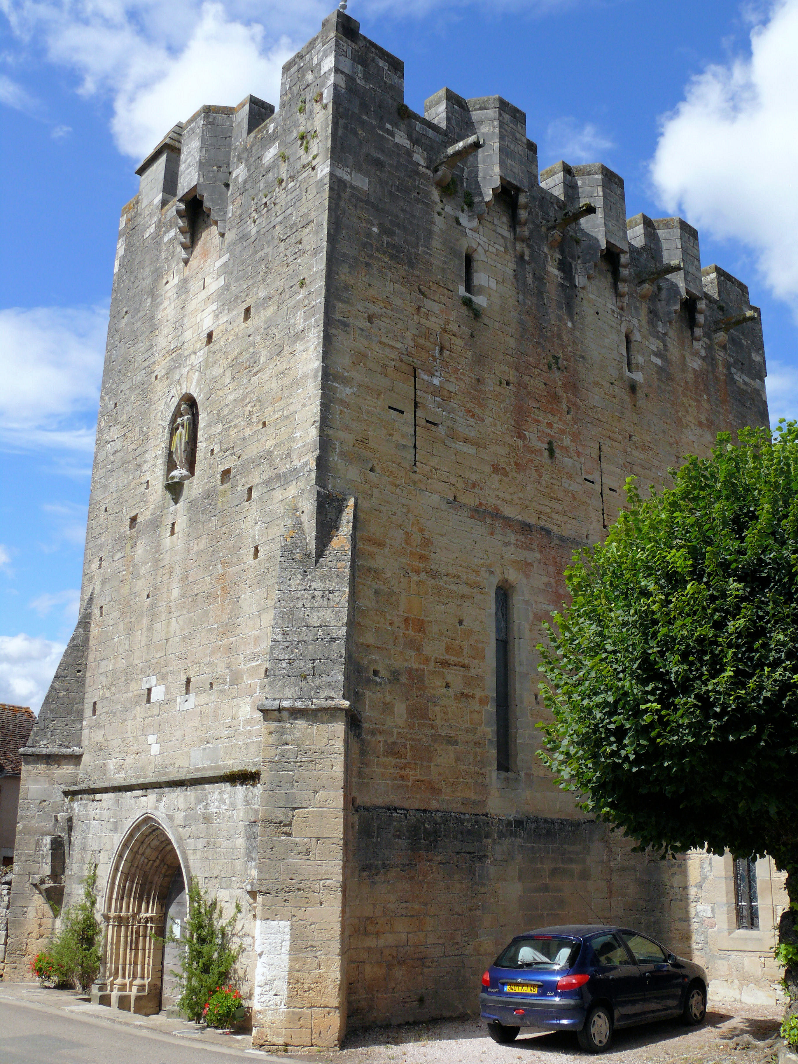 Rudelle - Eglise